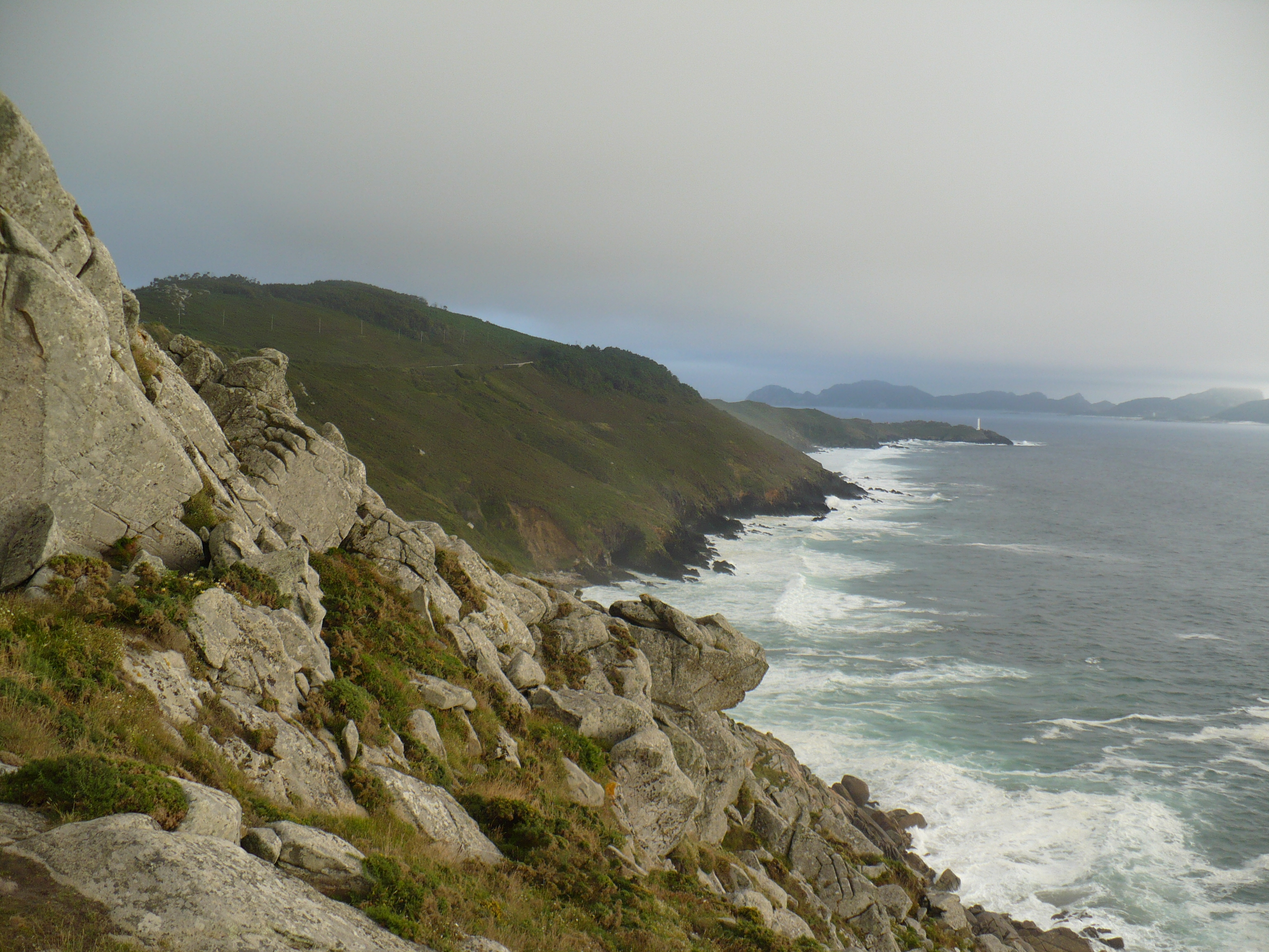 Fotografía da costa da Vela. Ao fondo vense o Cabo Home e as Illas Cíes.